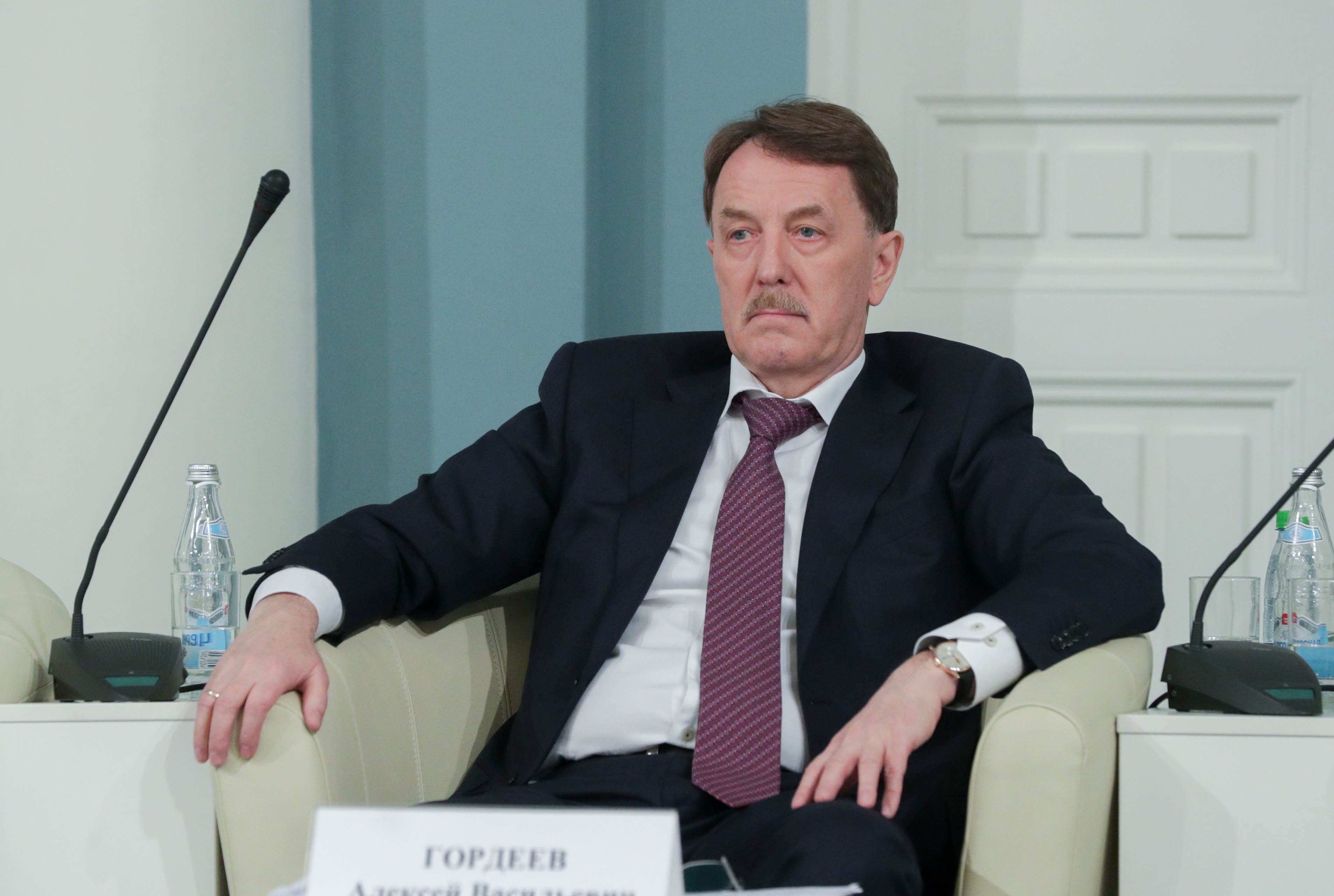 Алексей Васильевич Гордеев (род.1955) — российский государственный и политический деятель